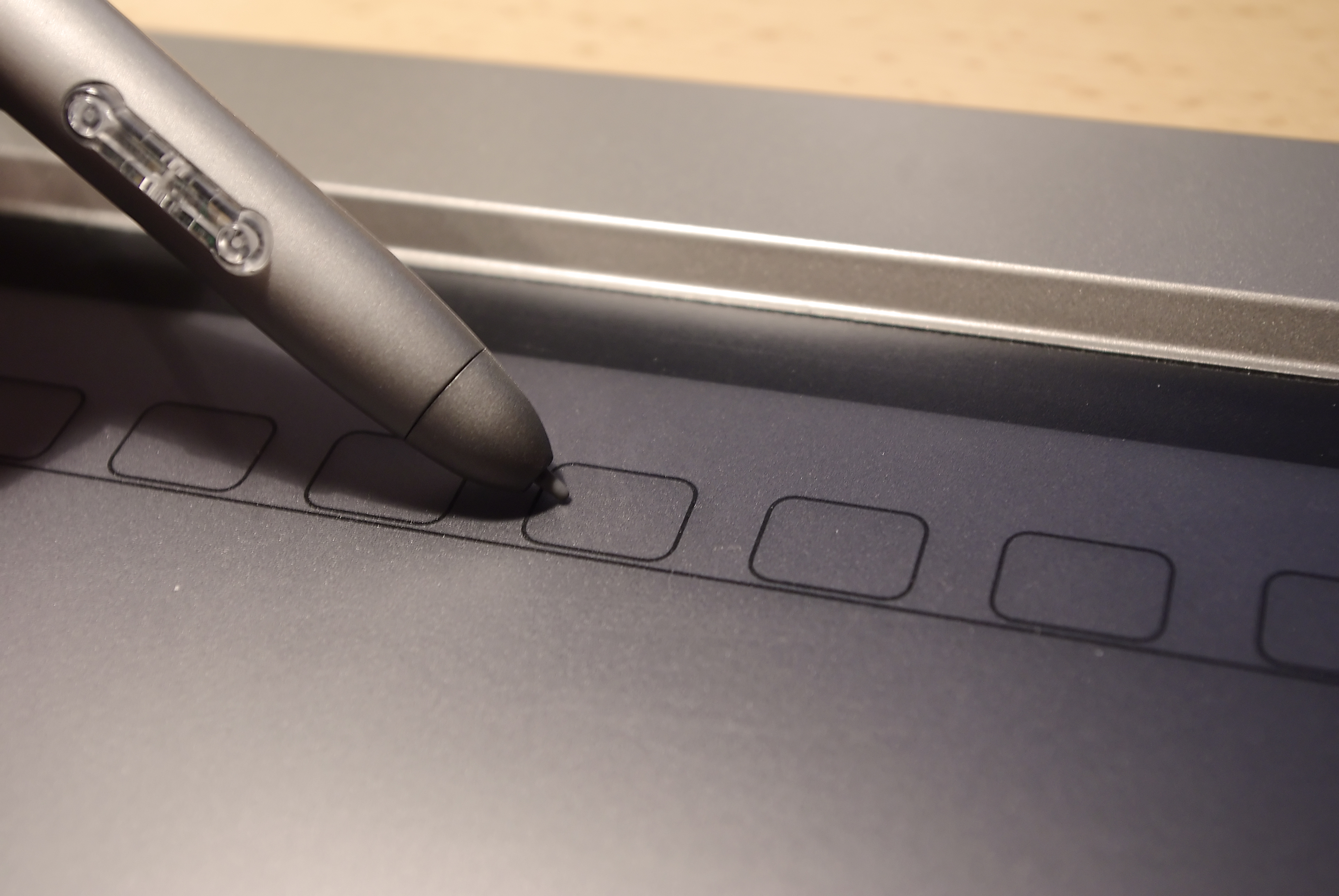 Digitaallaua sensoorsed nupud